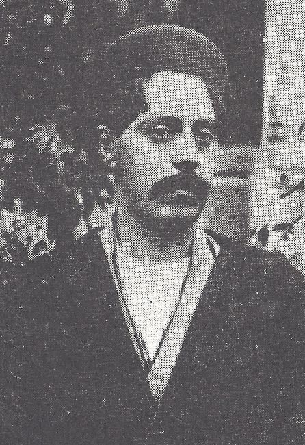 شیدای گراشی، شاعر قرن 13 و 14 هجری قمری